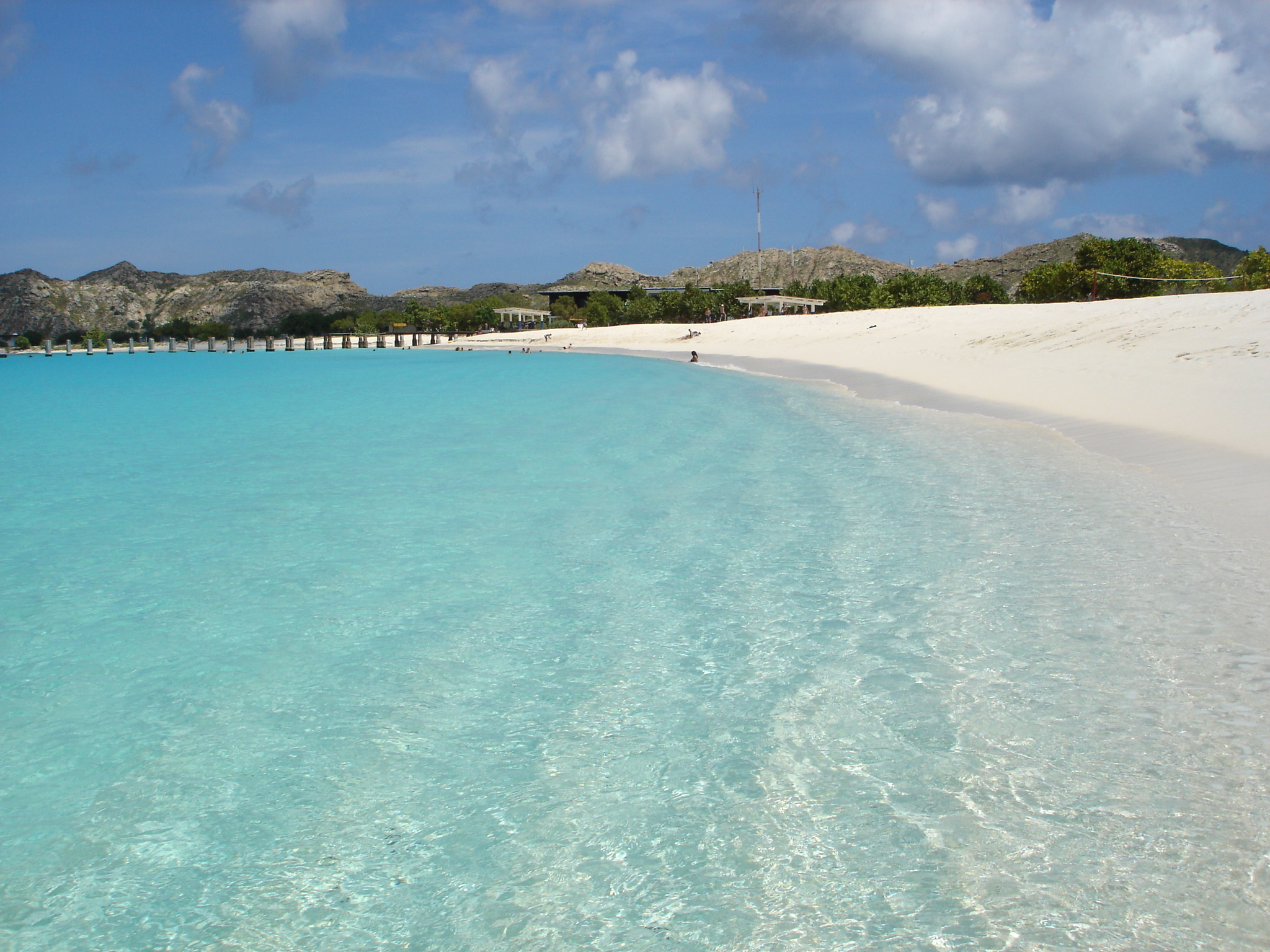 Imagen de una de las playas de la Isla la Orchila